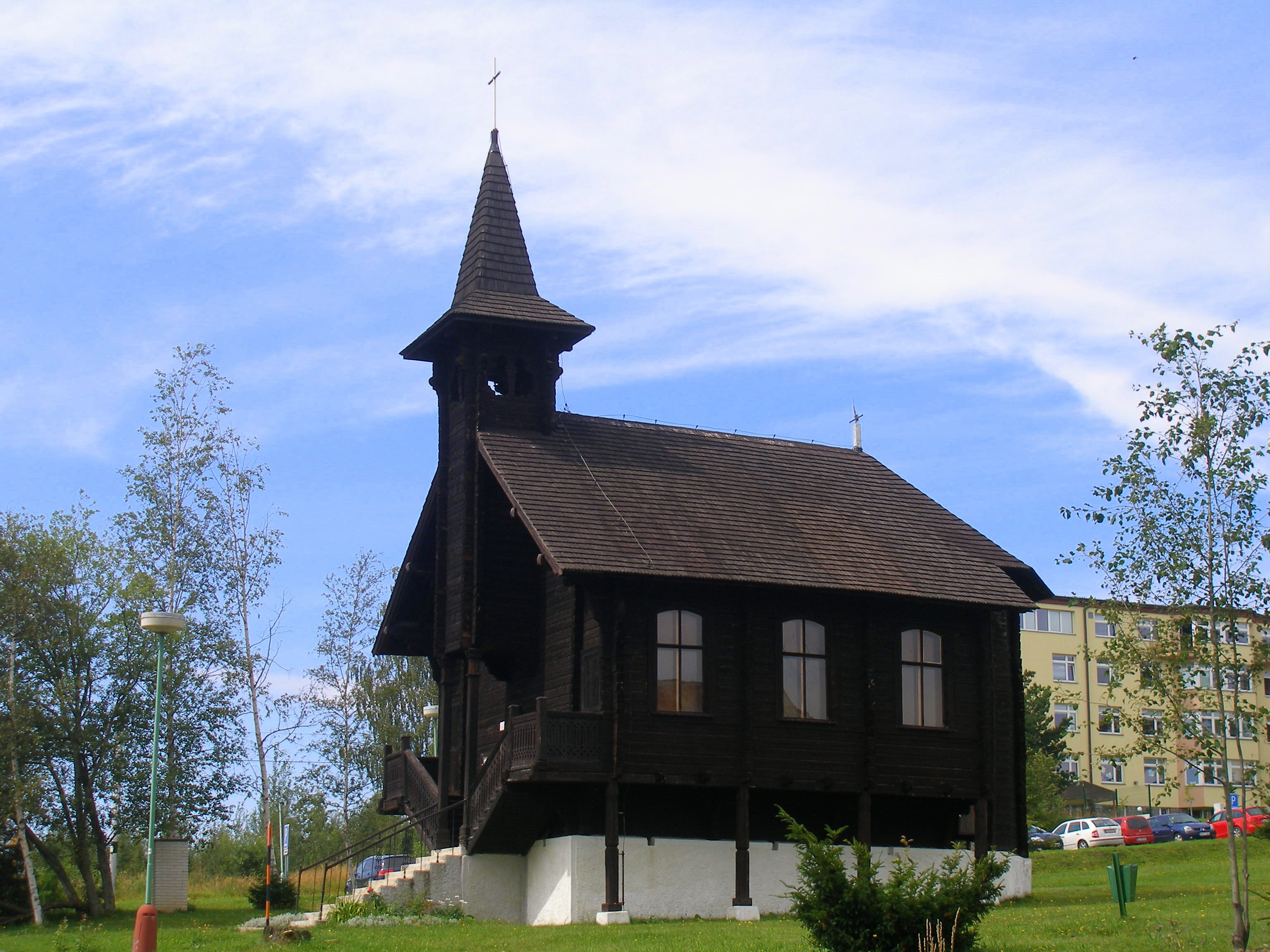 Tatranská osada Dolný Smokovec, mesto Vysoké Tatry, okres Poprad.